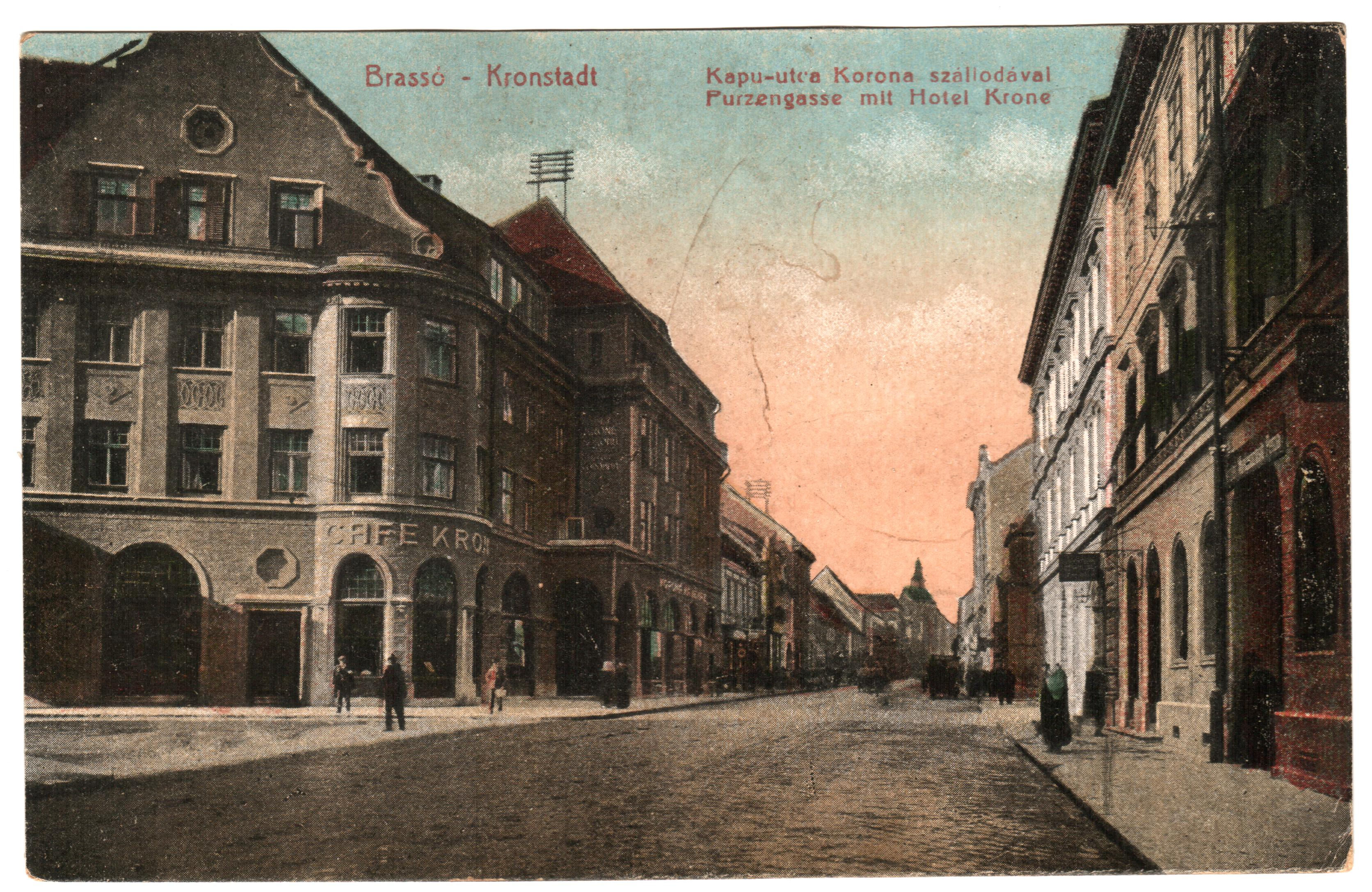 Brassó, Magyar Királyság. Korona Szálloda. Kapu utca, a szállodával. Purzengasse mit Hotel Krone.A Korona-szállót 1910 december utolsó napján adták át rendeltetésének. Hosszú ideig a város és messze a környék legmodernebb szállodája volt: saját parafával bélelt borpincével, élelmiszerraktárral, mélykúttal, villanyteleppel és omnibusszal, mely minden vonatinduláshoz-érkezéshez kiment az állomásra. Itt működött messze környéken a legelső lift. A száz szoba mindenikéből nyolc különböző gomb megnyomásával ugyanannyi szolgáltatást lehetett megrendelni. Minden szobában volt légkondicionálás és egy nagy központi porszívó fali csatlakozóval. A takarítónő nem a porszívógéppel, hanem egy csatlakozó rugalmas tömlővel járt szobáról szobára. Konyhája és borpincéje révén a Korona a két világháború közti időszakban is a város legelőkelőbb szállodája és vendéglője volt. A földszinti vendéglő nagy ablakait belülről a nyári melegben állandó vízfüggöny hűtötte. Brassó notabilitásai, szellemi és gazdasági elitjének tagjai sokszor és szívesen tartózkodtak itt.